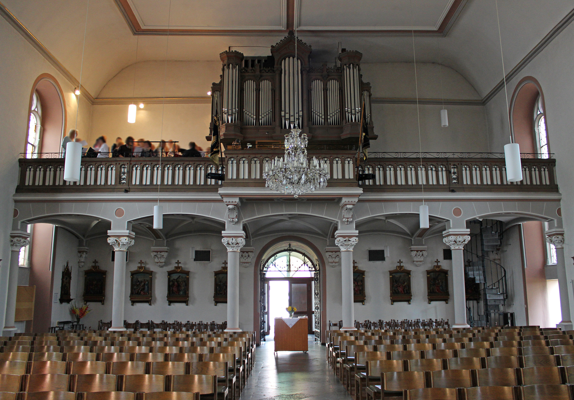 Blick ins Innere der kath. Pfarrkirche St. Petrus und Paulus in Beaumarais, Stadt Saarlouis, Saarland